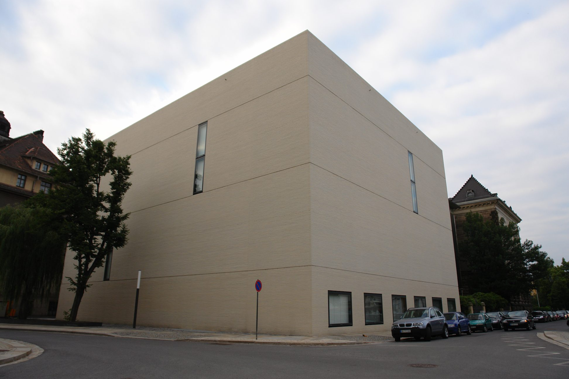 Neubau des Sächsischen Hauptstaatsarchives Dresden